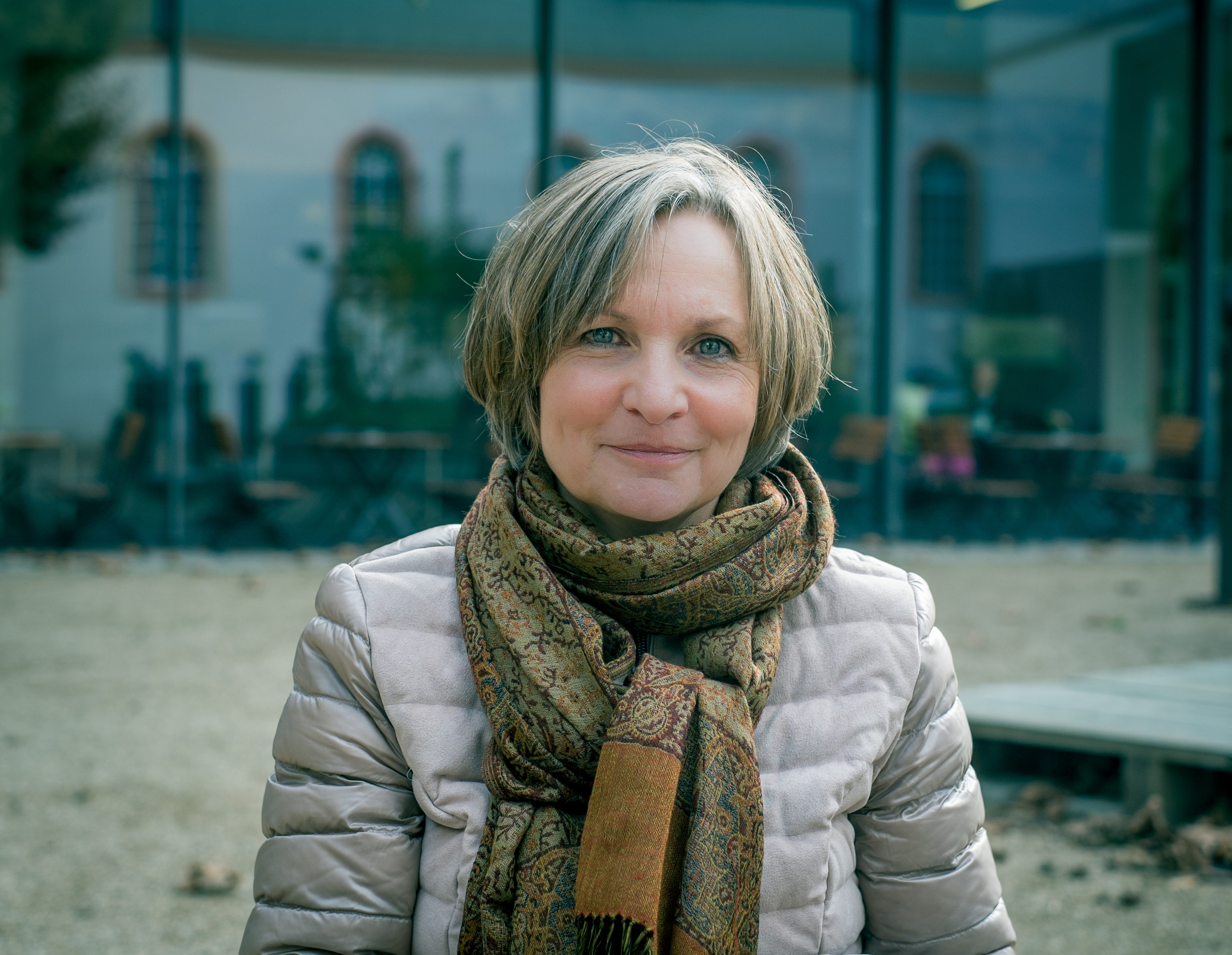 Iris Nieland